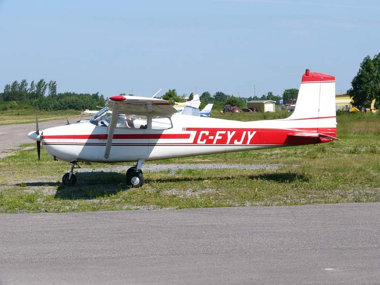 1957 model Cessna 172 Skyhawk